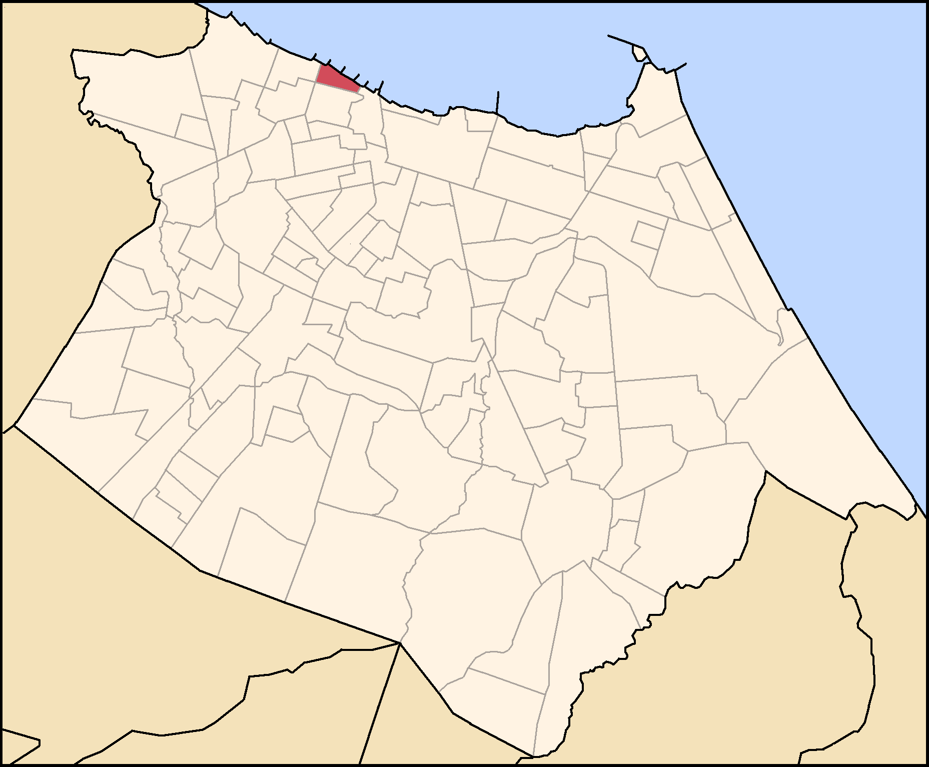 Bairro Pirambu na cidade de Fortaleza - Brasil